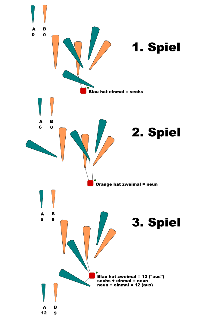 Auswertung der Knittelpunkte in drei aufeinanderfolgenden Spiele.